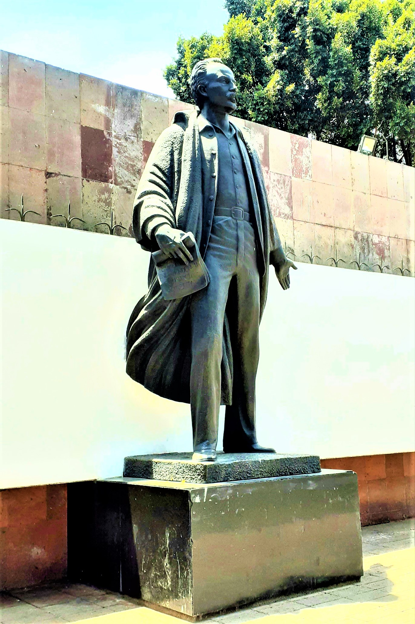 Jose Marti-DFMexico